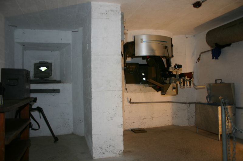 Maschinengewehr-Bunker Raten 1, Kt. Zug